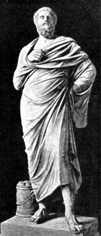 Sophokles aus Baumeister: Denkmäler des klassischen Altertums. 1888. Band III., Seite 1685.